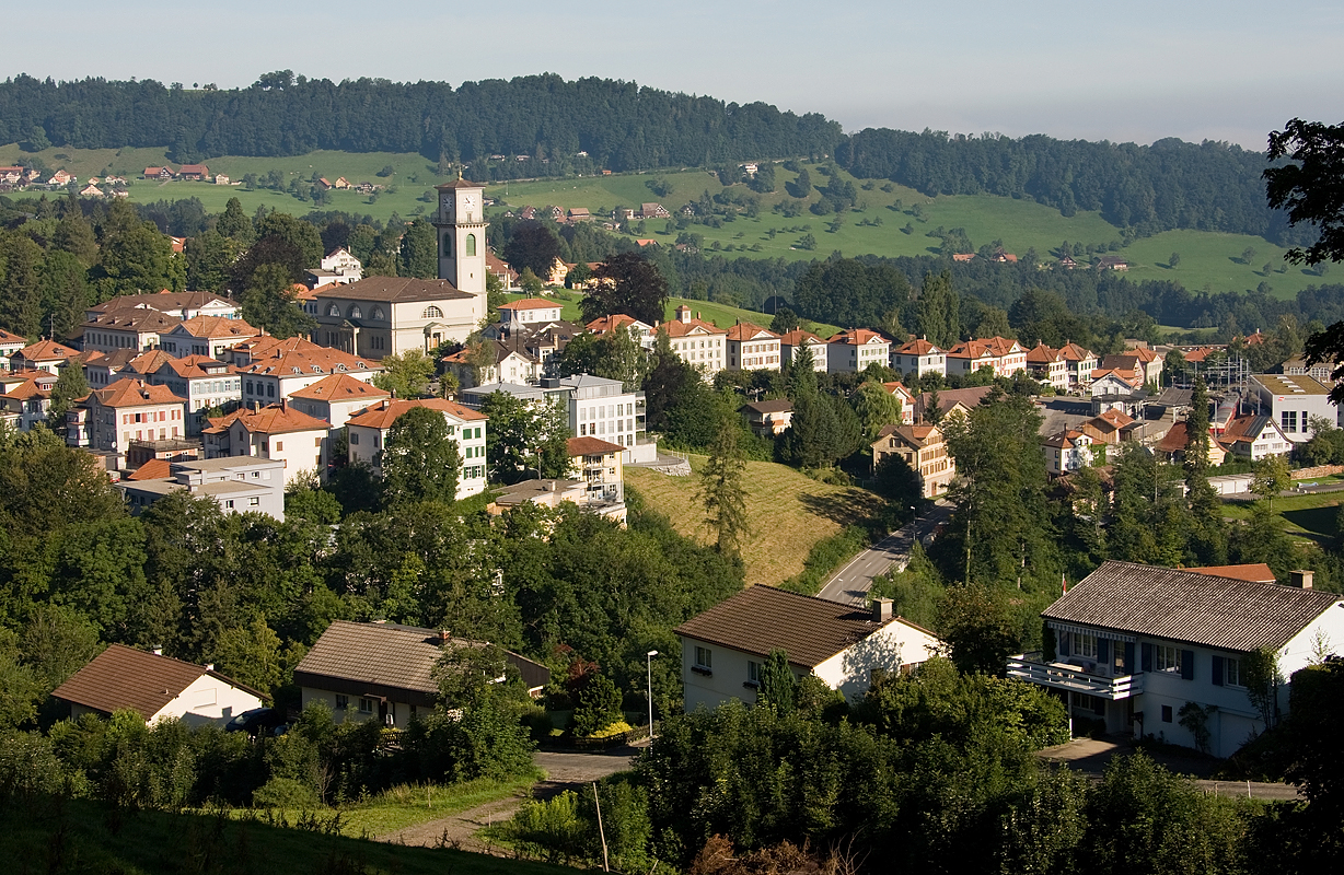 Oestlicher Teil des Dorfes Heiden